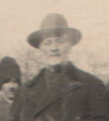 Pr. V. Cosbuc (foto Ancient)